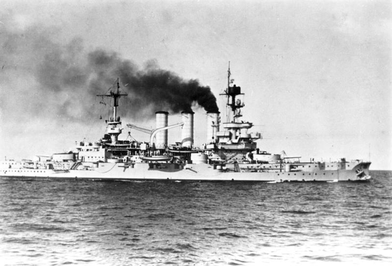 Linienschiff "Hessen" Linienschiff "Hessen" (später Zielschiff)